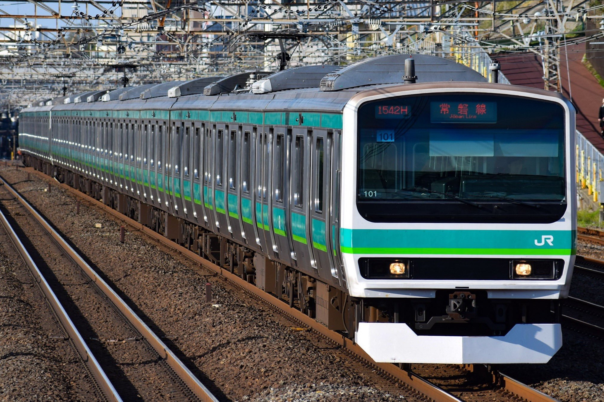 常磐線を走行するE231系0番台マト101編成